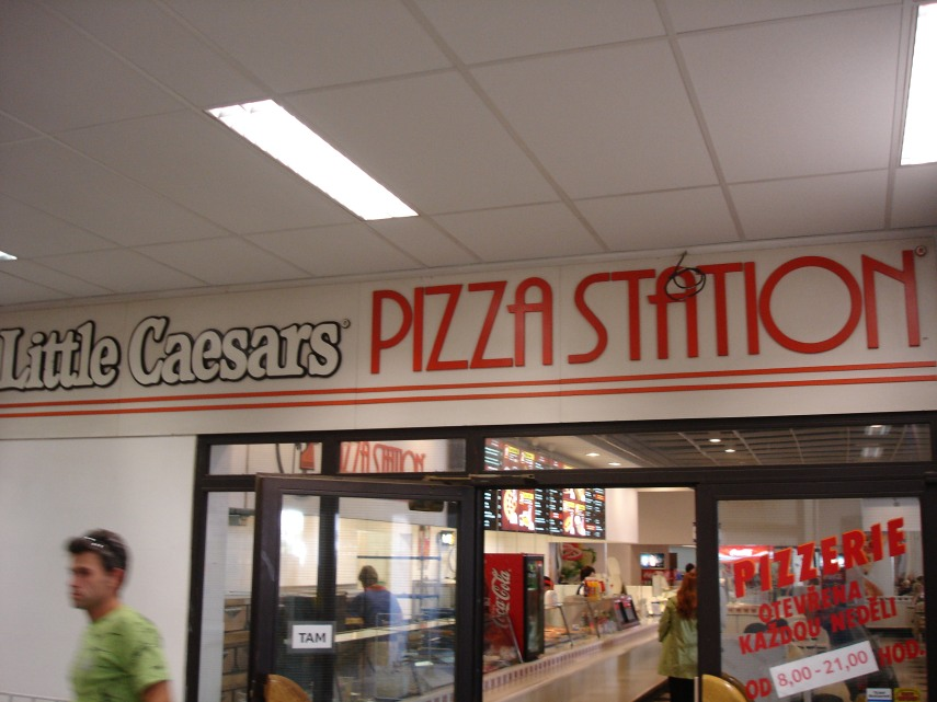 Little Caesars Pizza Station in Brno, Czech Republic